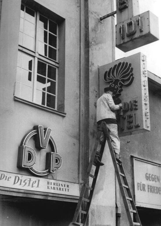 Berlin, Kabarett "Die Distel", Leuchtreklame Zentralbild Krueger 27.4.1954 Distel kriegt ein Leuchtschild. Das Berliner Kabarett Die Distel erhält eine leuchtende Distel als Neonröhren. UBz: Die Maler bei den letzten Verschönerungsarbeiten.